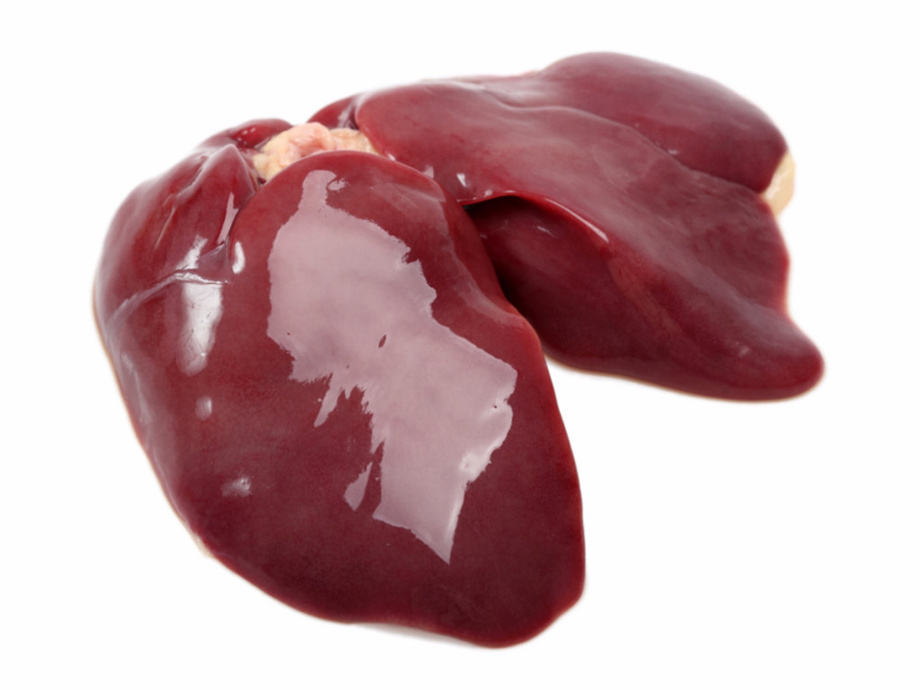 Печень куриная